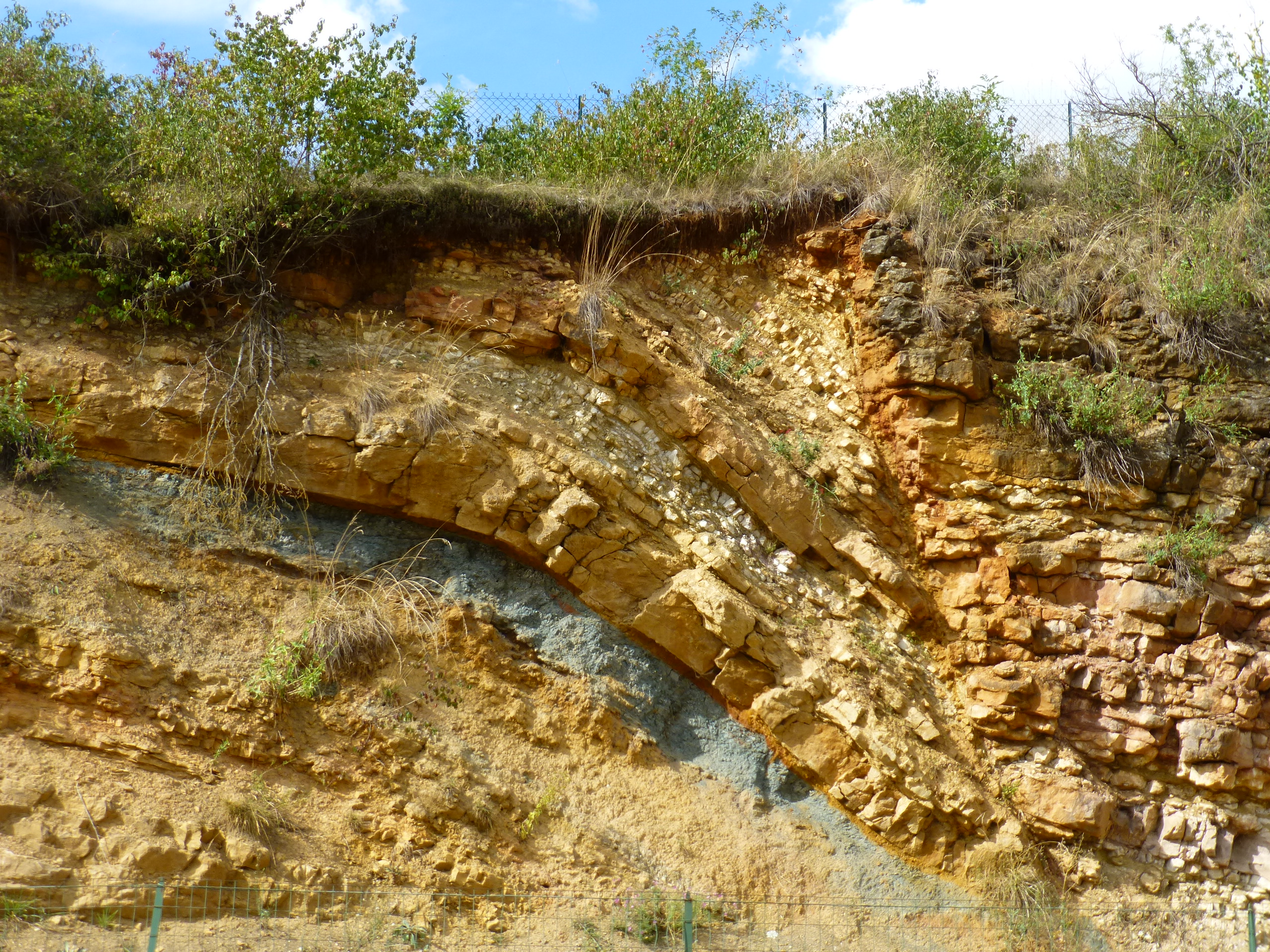 Faille géologique de l'espace des Pierres Folles à Saint-Jean-des-Vignes (69)